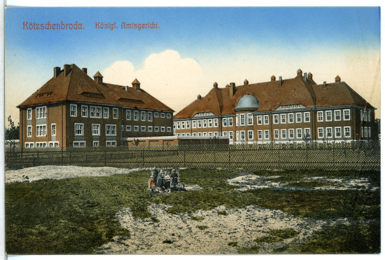 Kötzschenbroda; Königliches Amtsgericht This postcard is from publisher Brück & Sohn in Meißen ( postcard has a unique number 12817 and is available in a higher resolution at the publisher. This images was uploaded in a cooperation project between Wikipedians and the publisher.